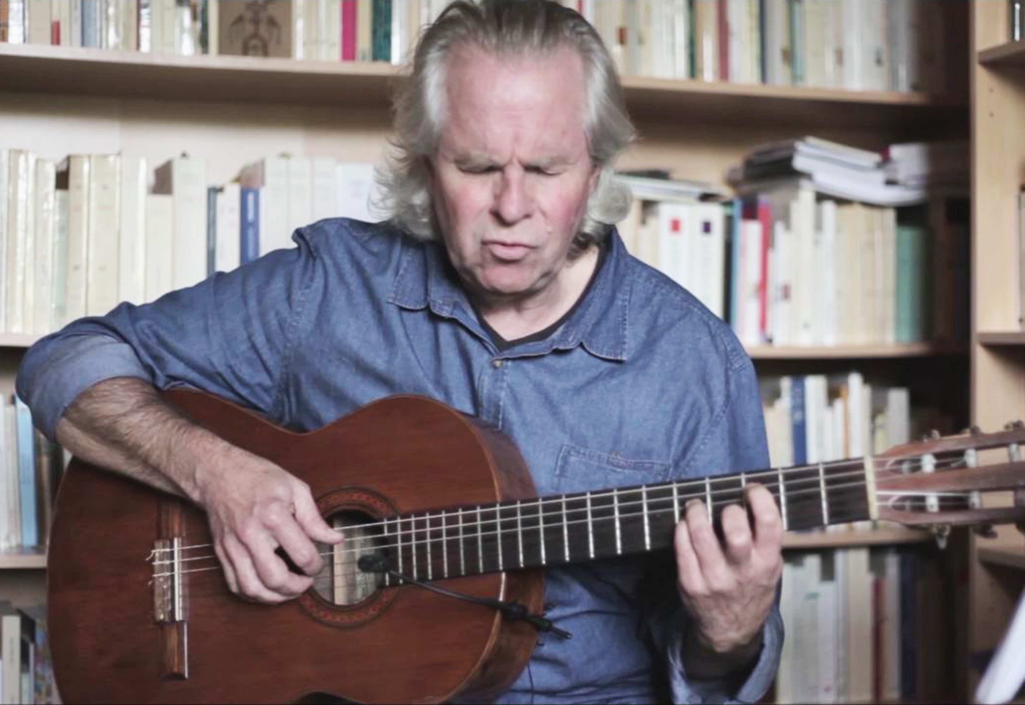 Paul Dirmeikis